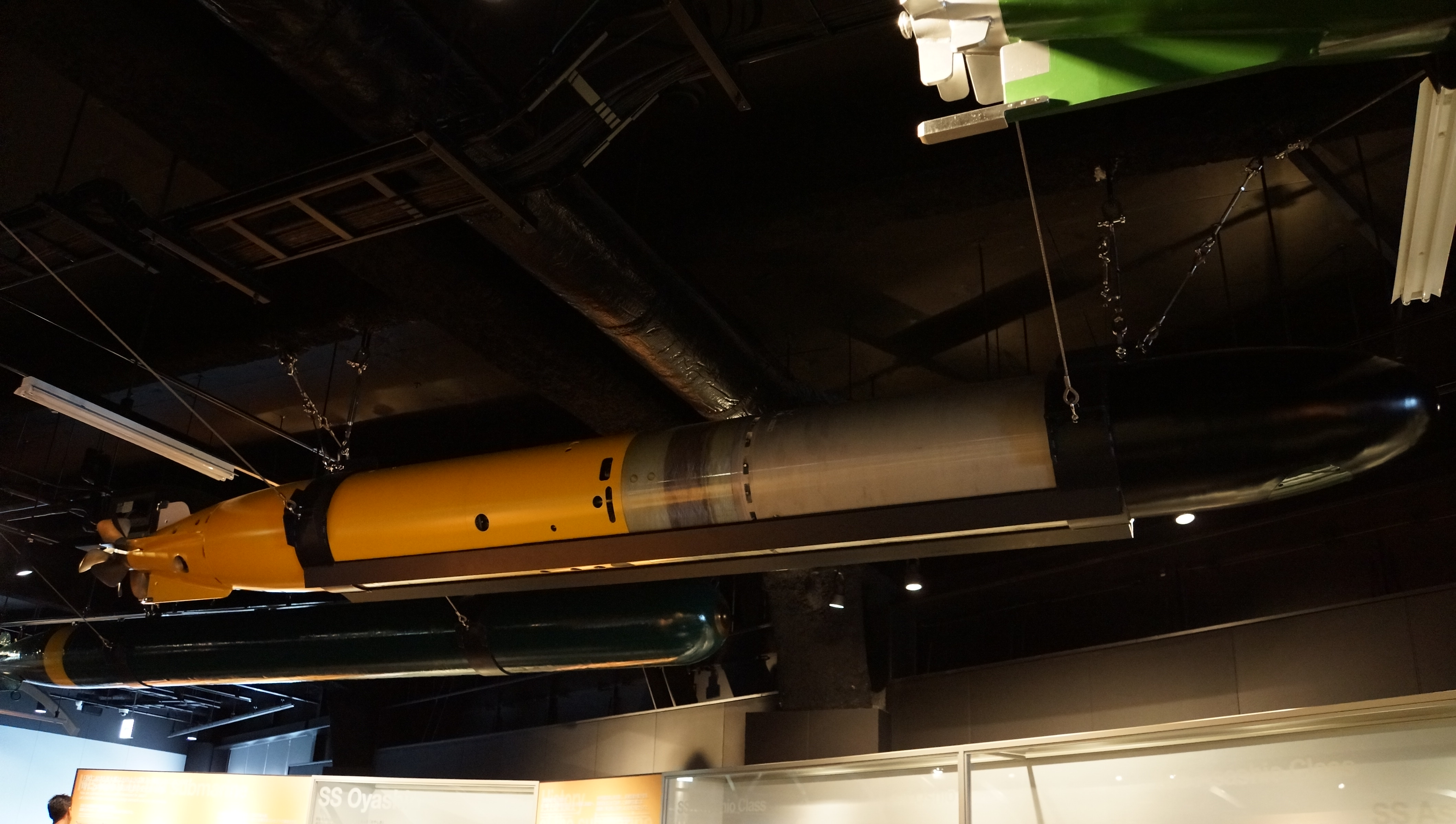 海上自衛隊 72式魚雷。 14年9月15日 海上自衛隊呉史料館内にて。